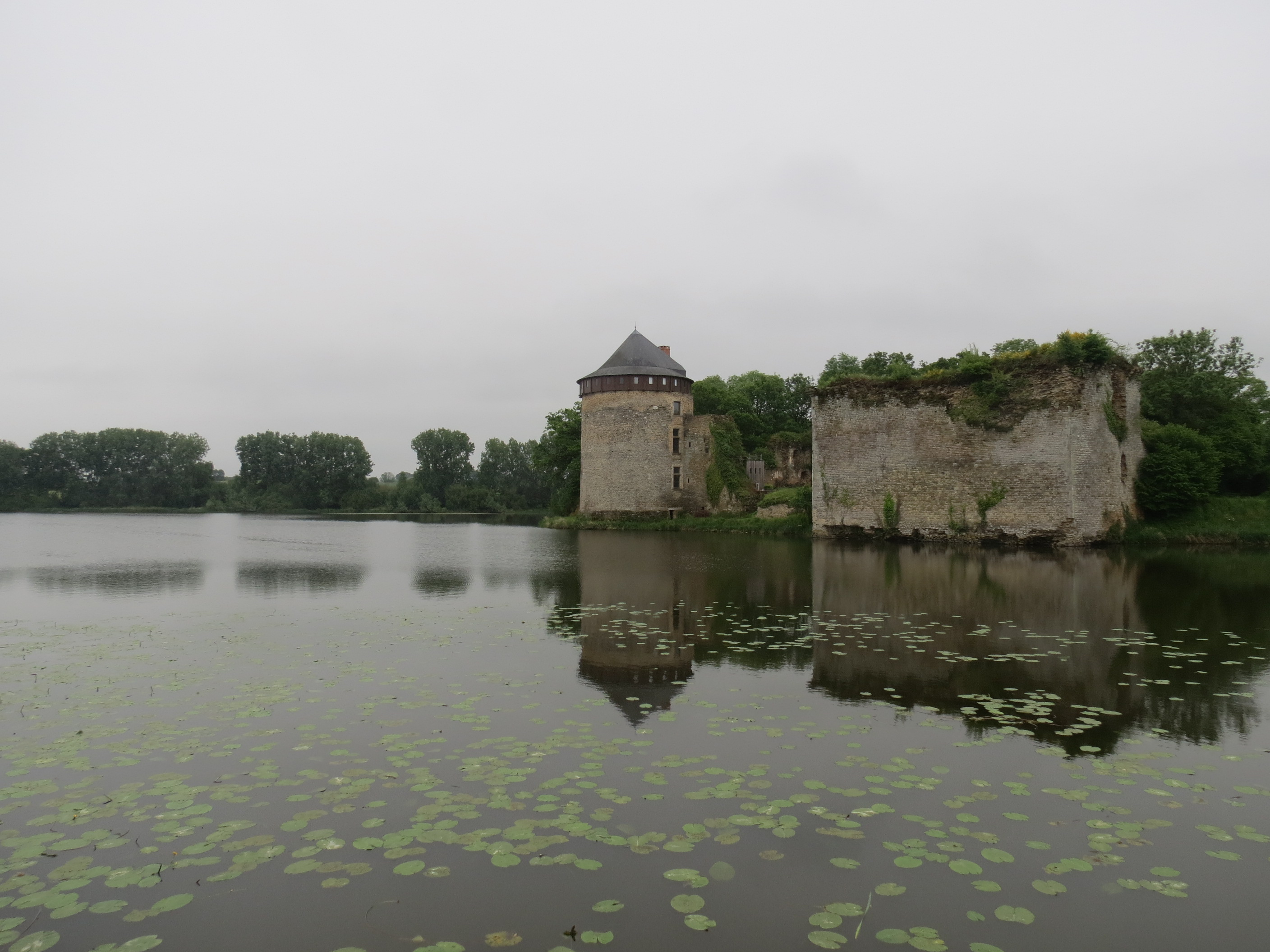 Montjean (53) - Château